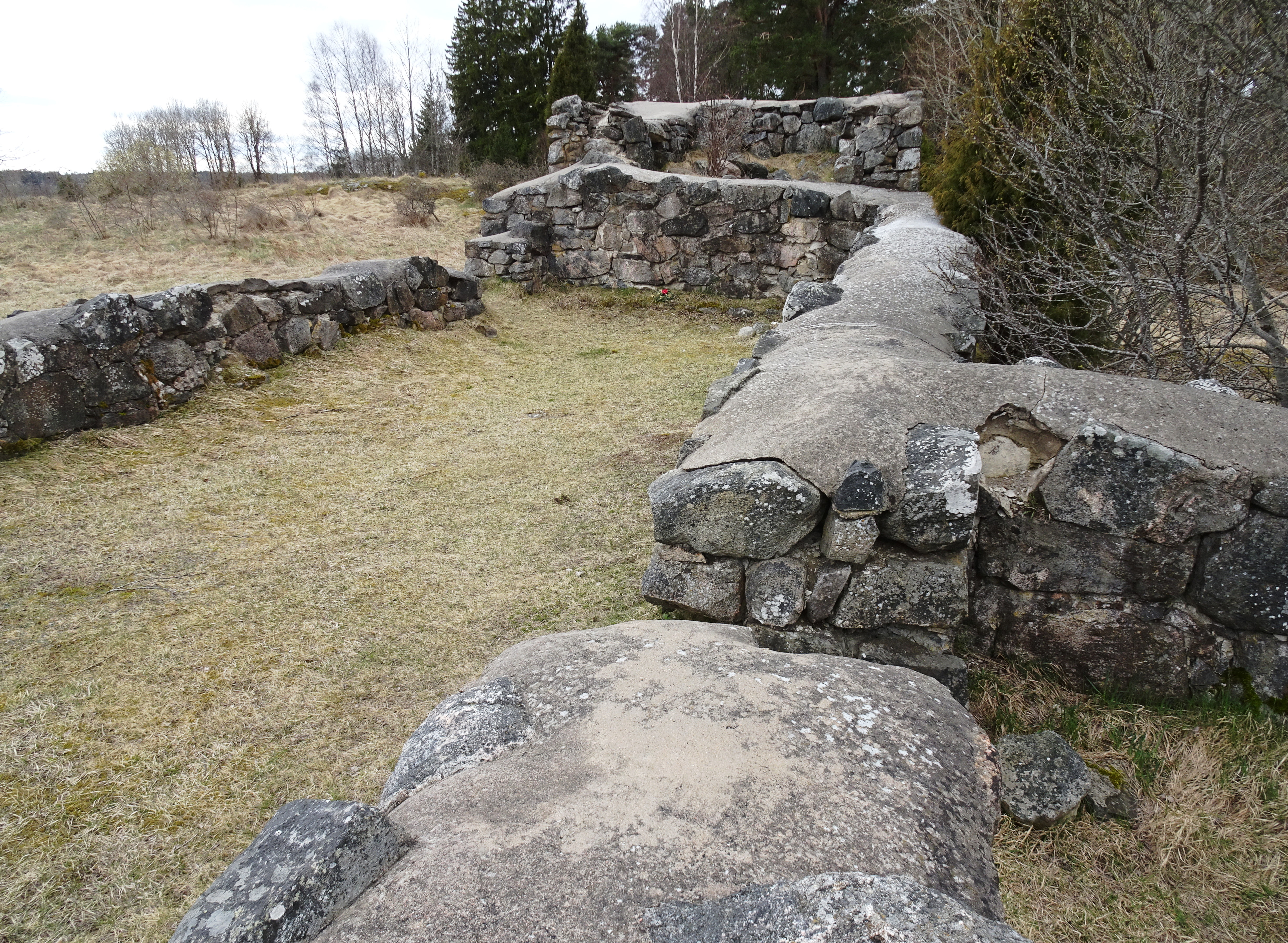 Överhölö kyrkoruin